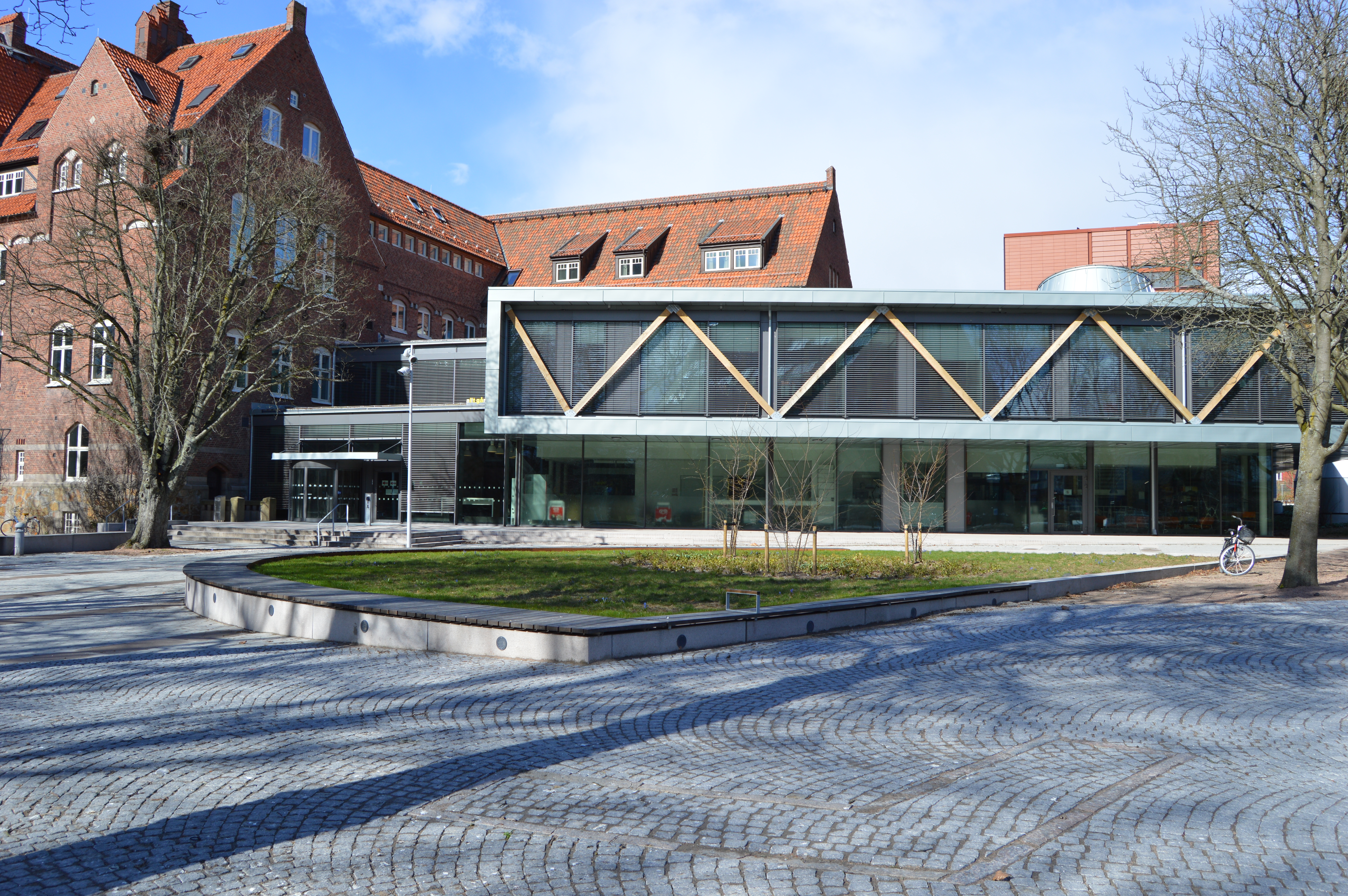 LUX i Lund.